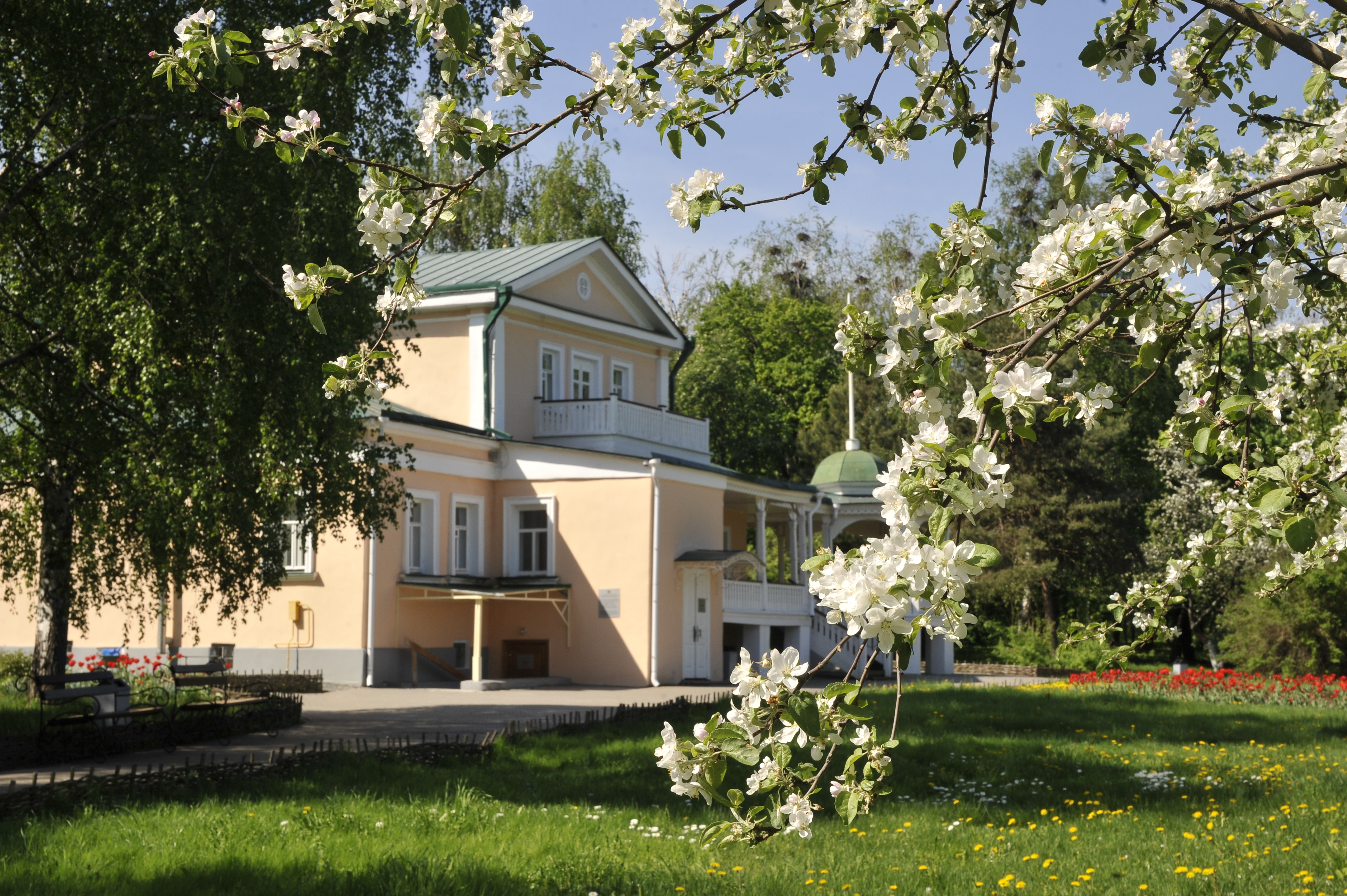 В этом здании расположен музей поэмы «Анна Снегина»